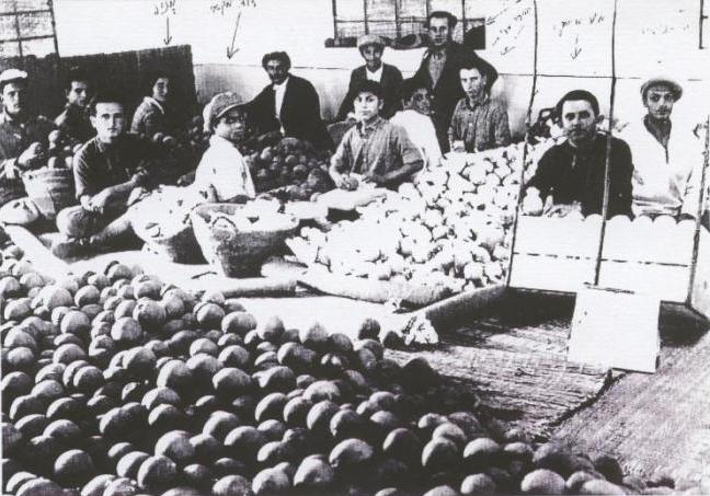 קבוצת אריזה- בפרדס בשיסט